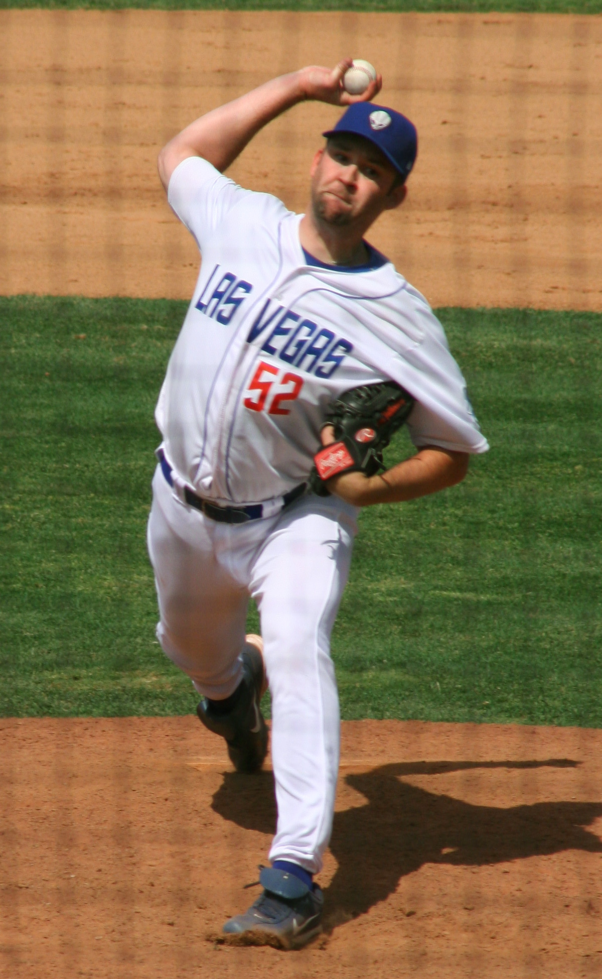 Brian Falkenborg